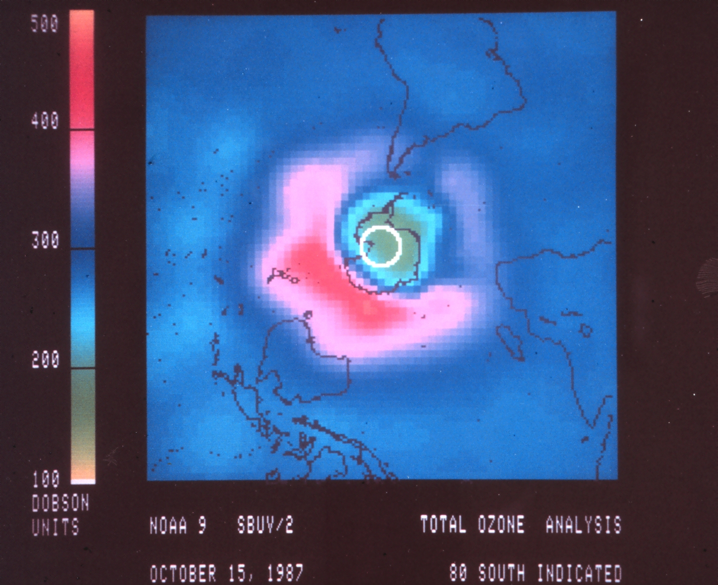 carte montrant le trou d'ozone au dessus de l'antarctique en fausse couleurs (version haute résolution disponible)